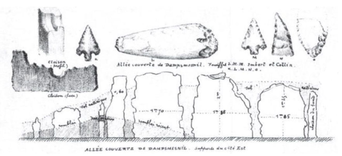 Supports côté est de l'allée couverte de Dampsmesnil dessinée par Léon Coutil vers 1897